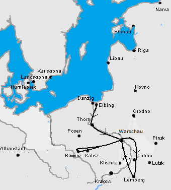 Feldzug Karls XII. 1704-05